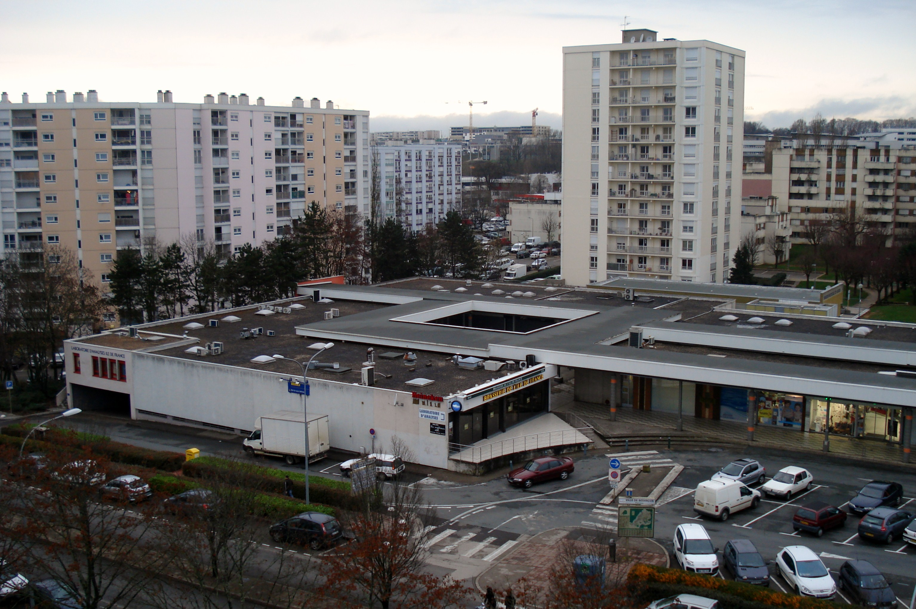 Le centre commercial d'Île-de-France et les bâtiments allentour à Planoise, dans la ville de Besançon (Doubs, France).